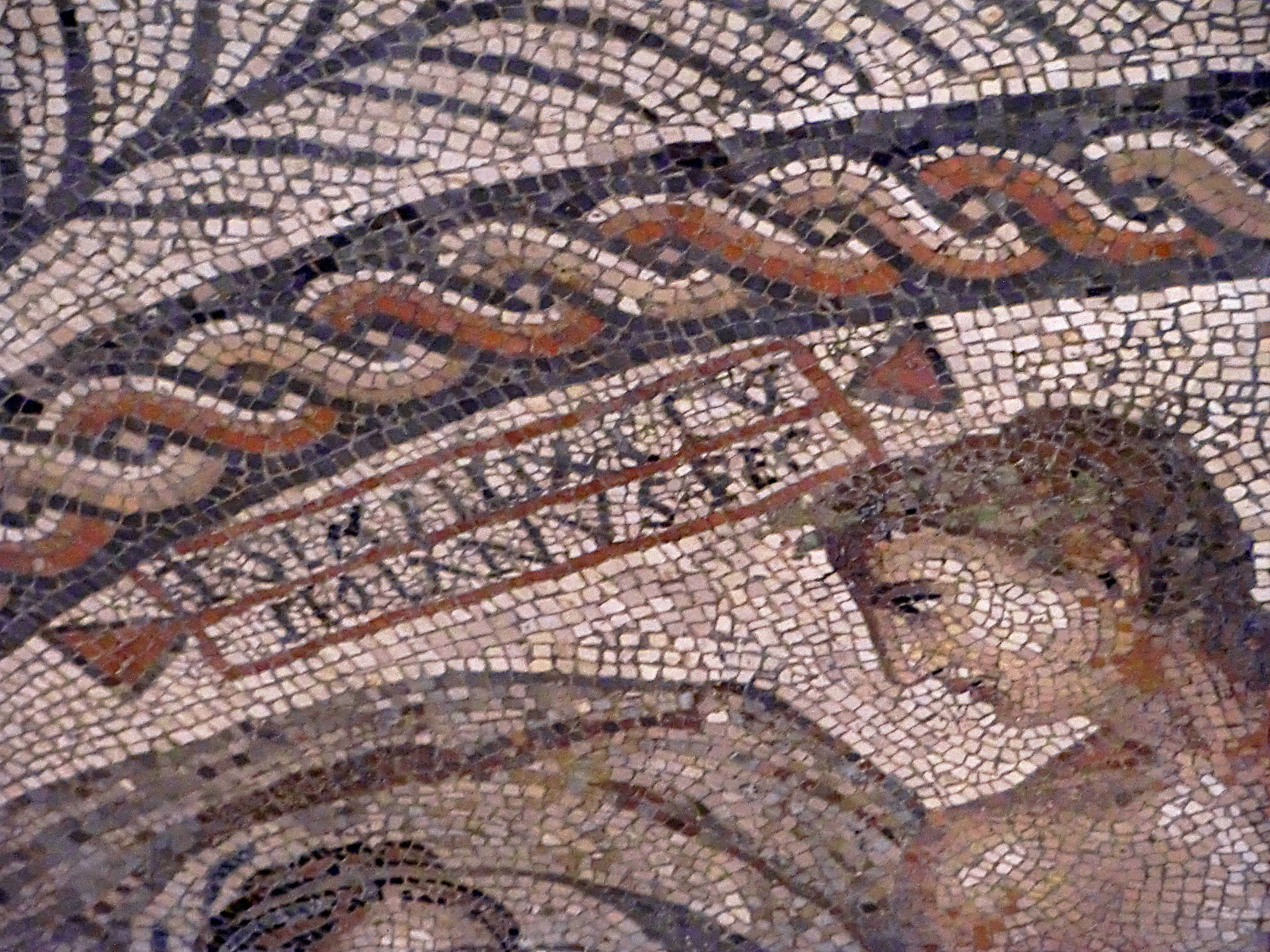 Mosaïque de Lillebonne - détail